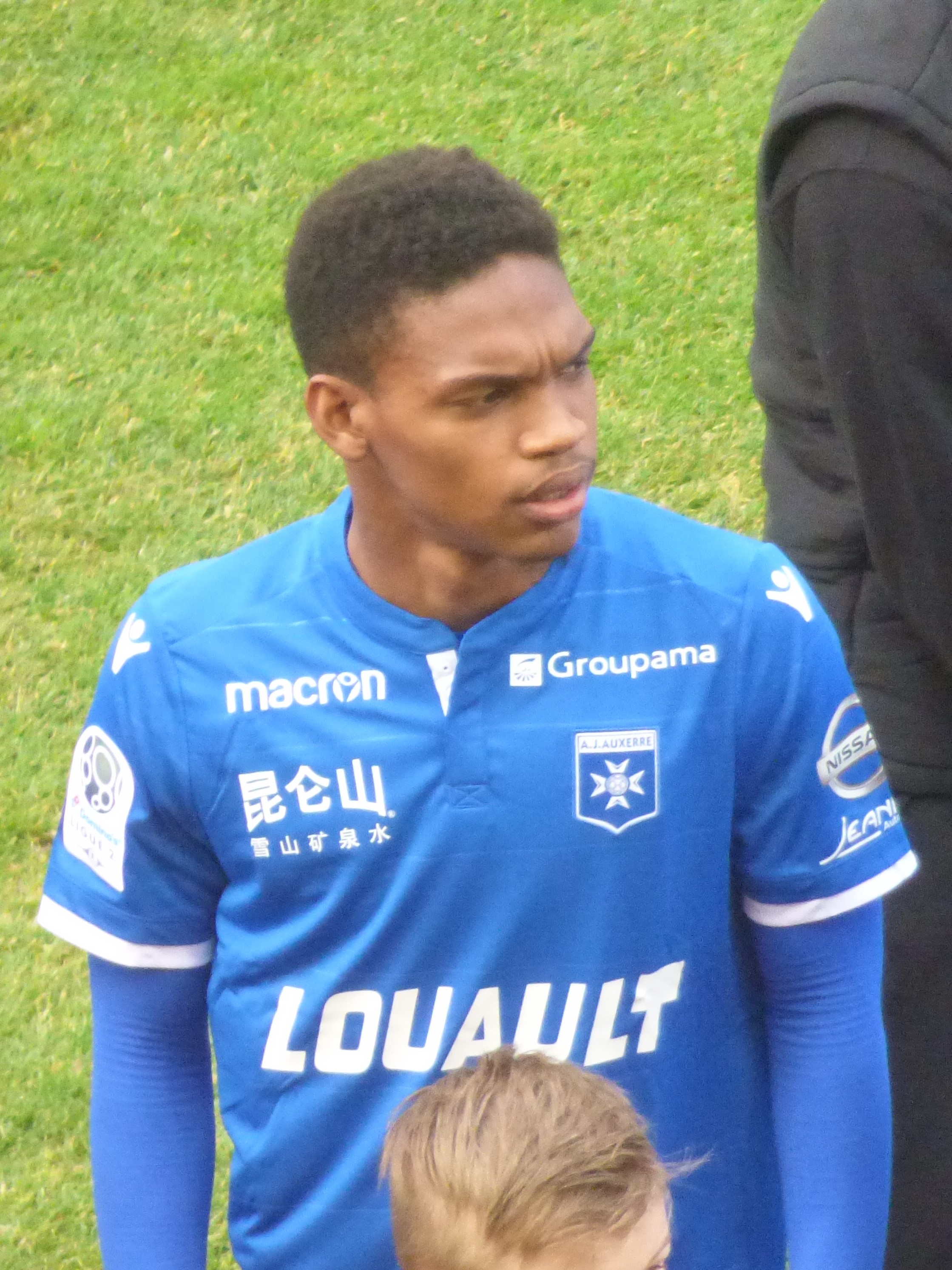 Kenji-Van Boto avant le match RC Lens - AJ Auxerre, comptant pour la 28ème journée du championnat de France de football de Ligue 2 2018-2019, le 9 mars 2019 au Stade Bollaert-Delelis.